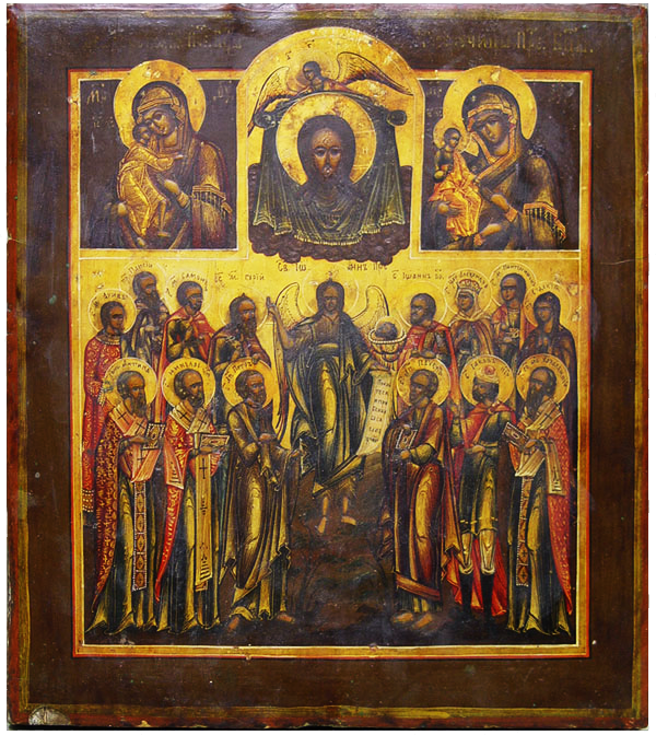 Икона «Собор Святого Иоанна Предтечи», дерево, левкас, темпера, позолота. Россия, XIX век, размер: 36 × 31,5 см